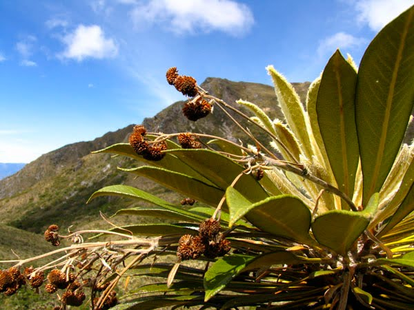 Chita